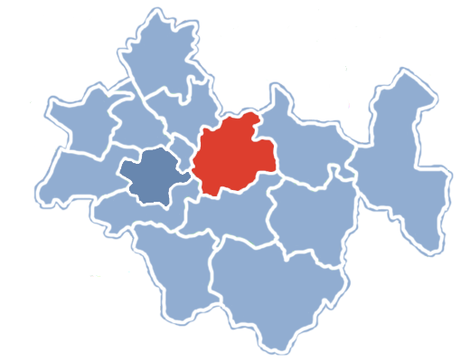 Położenie gminy Kodrąb na terenie powiatu radomszczańskiego.